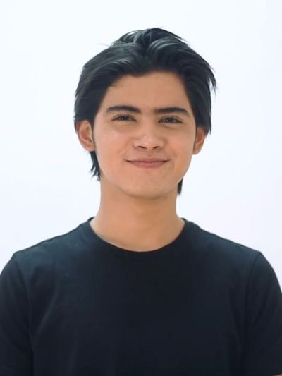 Aliando Syarief di Gogirl! TV